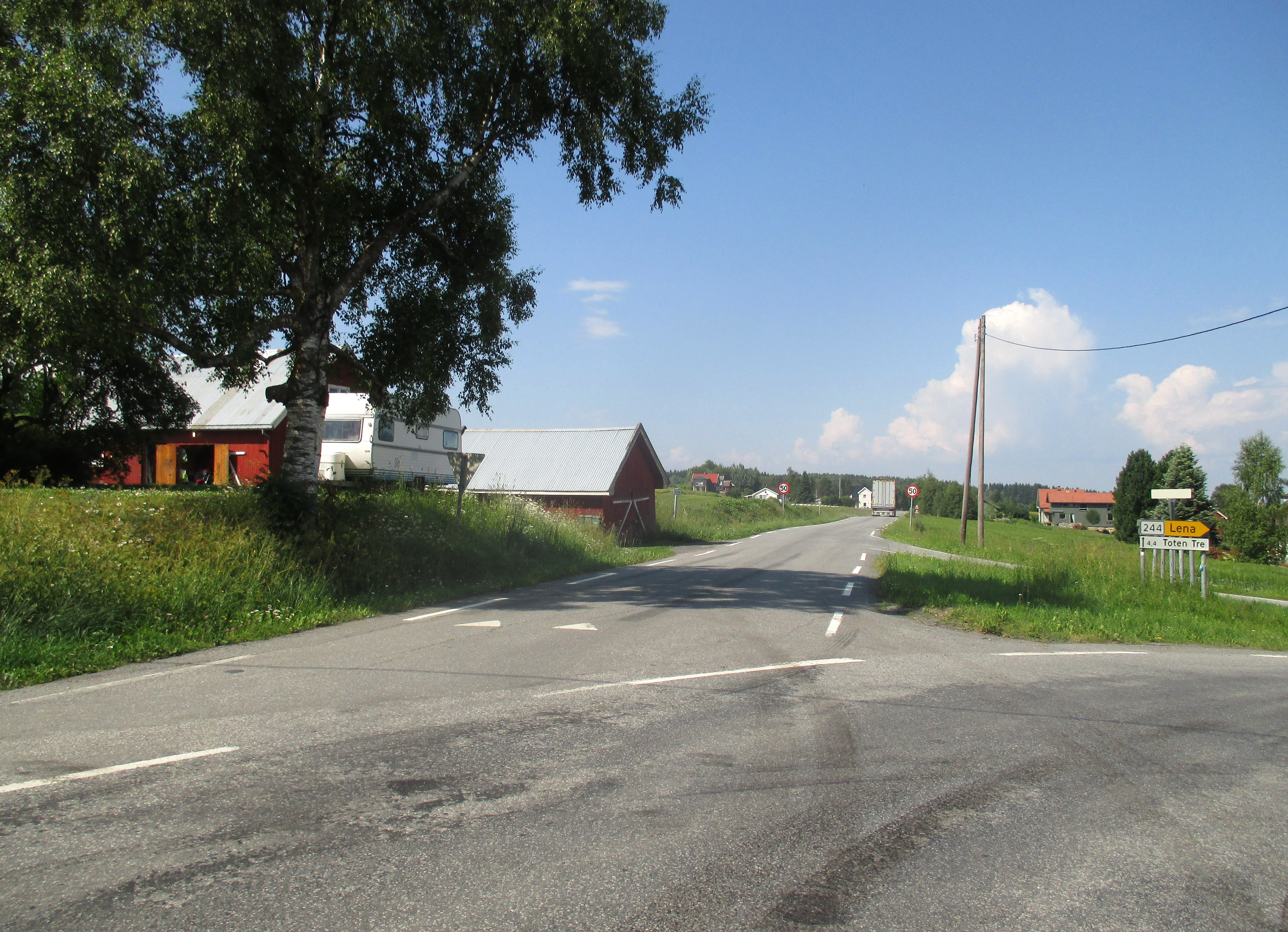 Sørenden av fylkesvei 2352 (tidl. FV84) i Østre Toten kommune